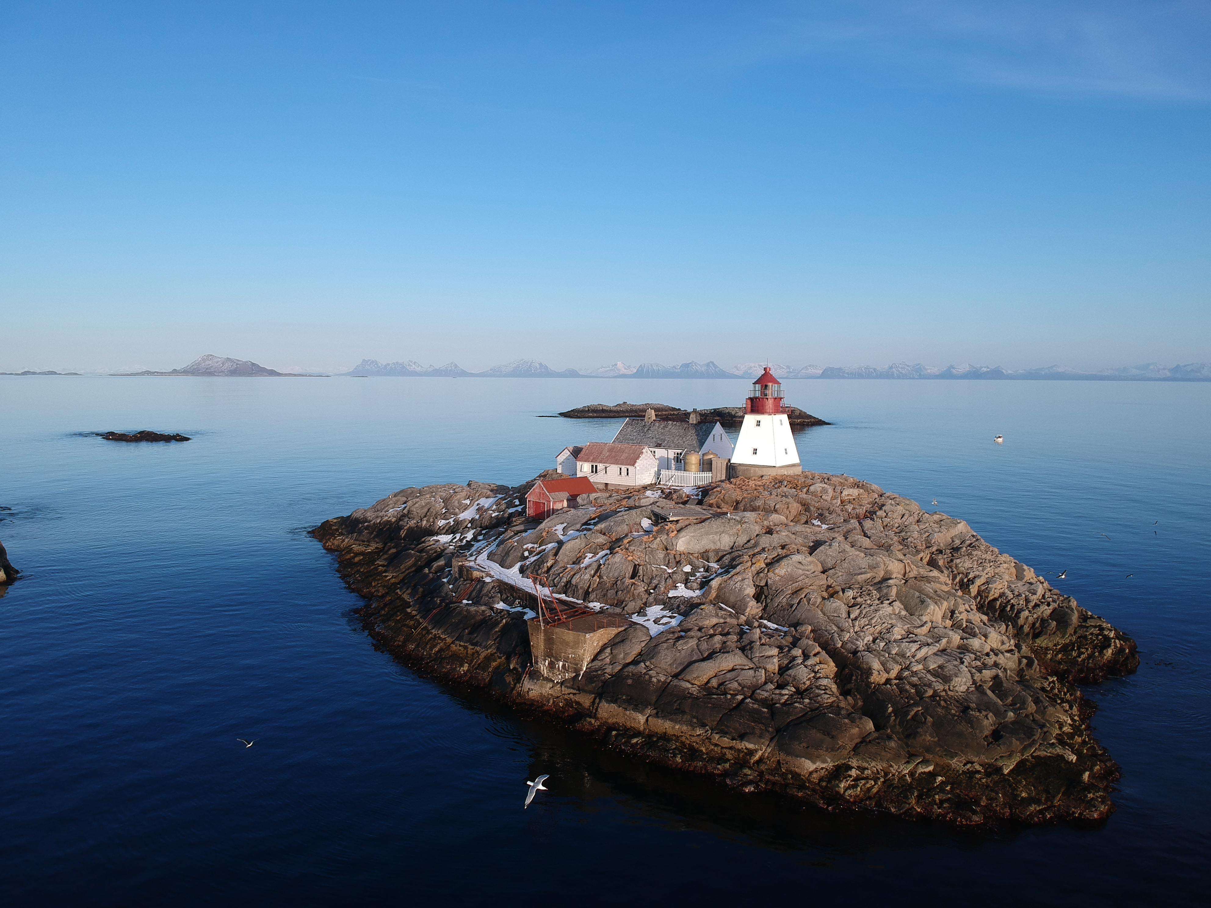 Dronebilde tatt av Moholmen fyr